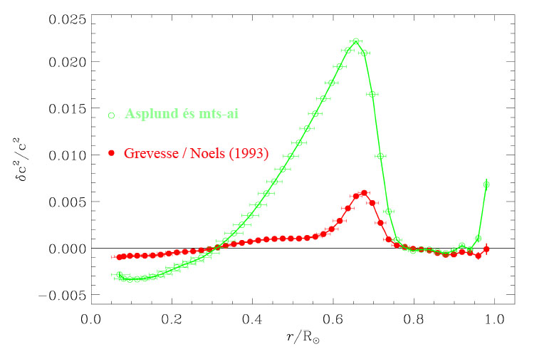 Helioseizmology